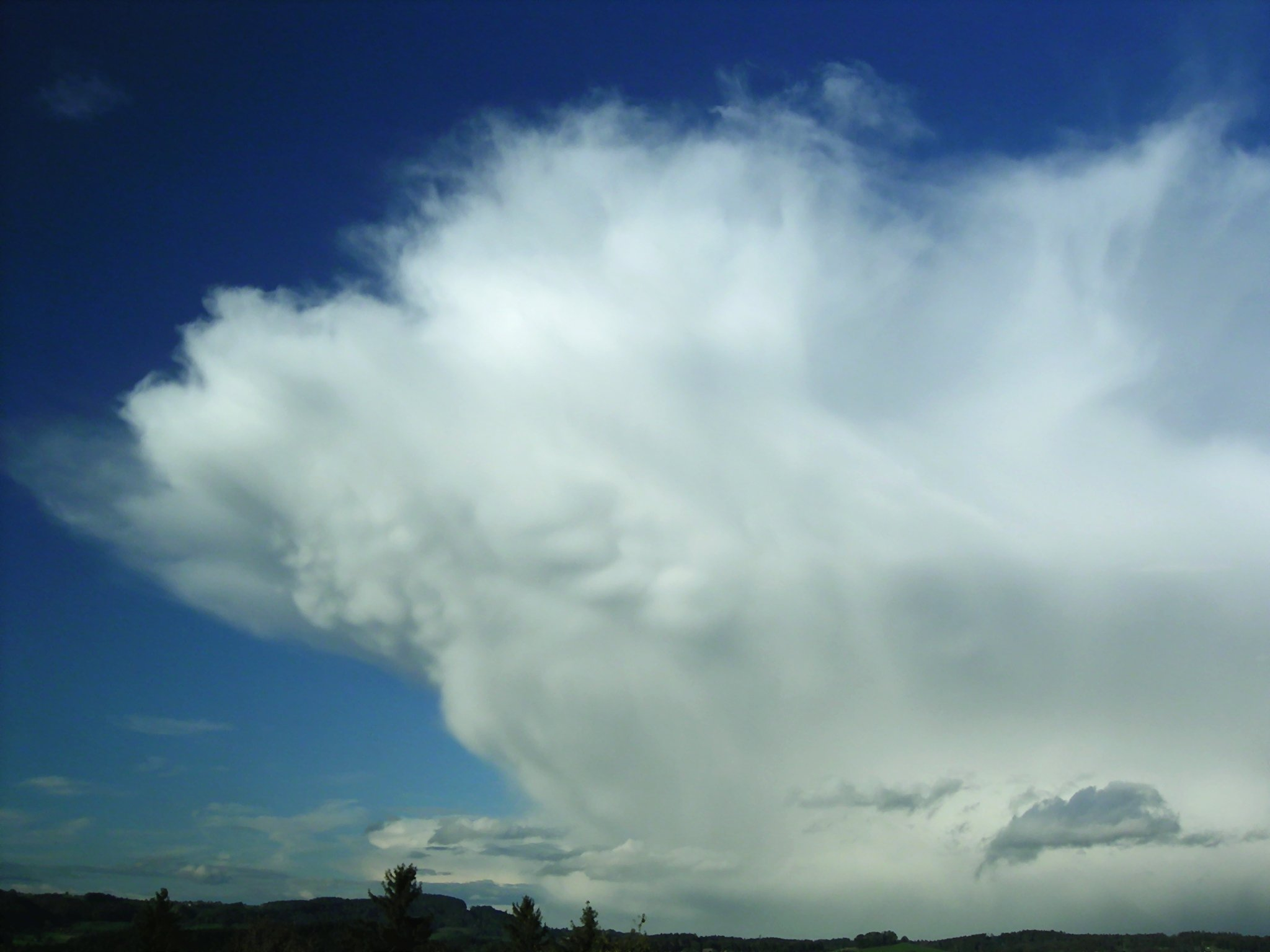 (en) Big Cumulonimbus during a cold front, with Cb mammatus (de) Riesiger Cumulonimbus während einer Kaltfront, mit Mammatus-Auszeichnungen Aufnahmeort: Uzwil (SG), in Richtung Norden (Bodensee). Schweiz. Bearbeitung: Kontrast verbessert, Flecken entfernt (GIMP)